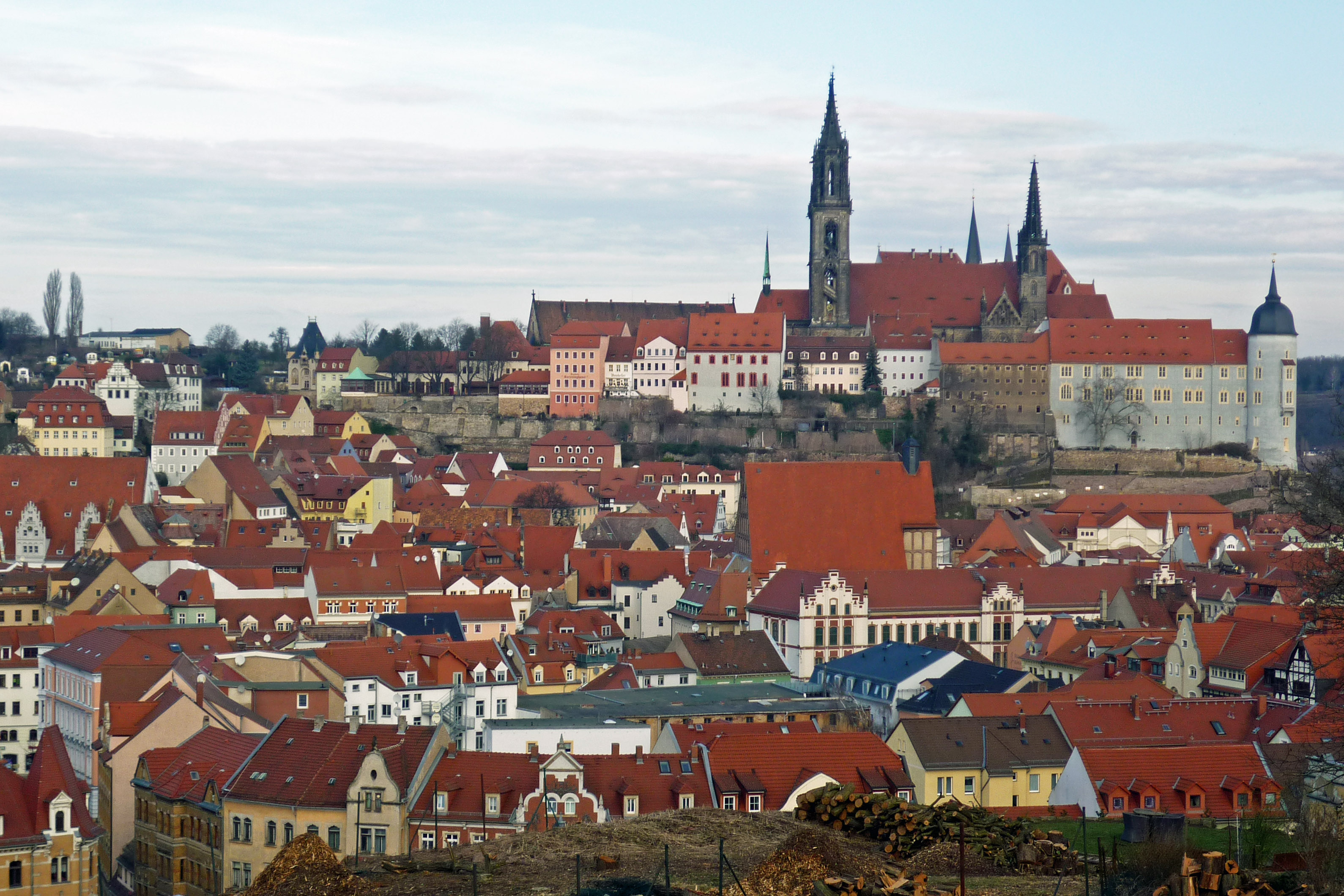 Blick vom OT Plossen auf Meißen